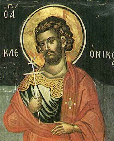 św. Kleonik z Amasji